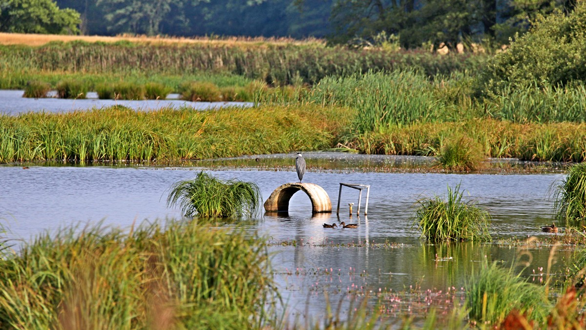 Graureiher in vernässtem Eldegebiet bei Kieve in Mecklenburg